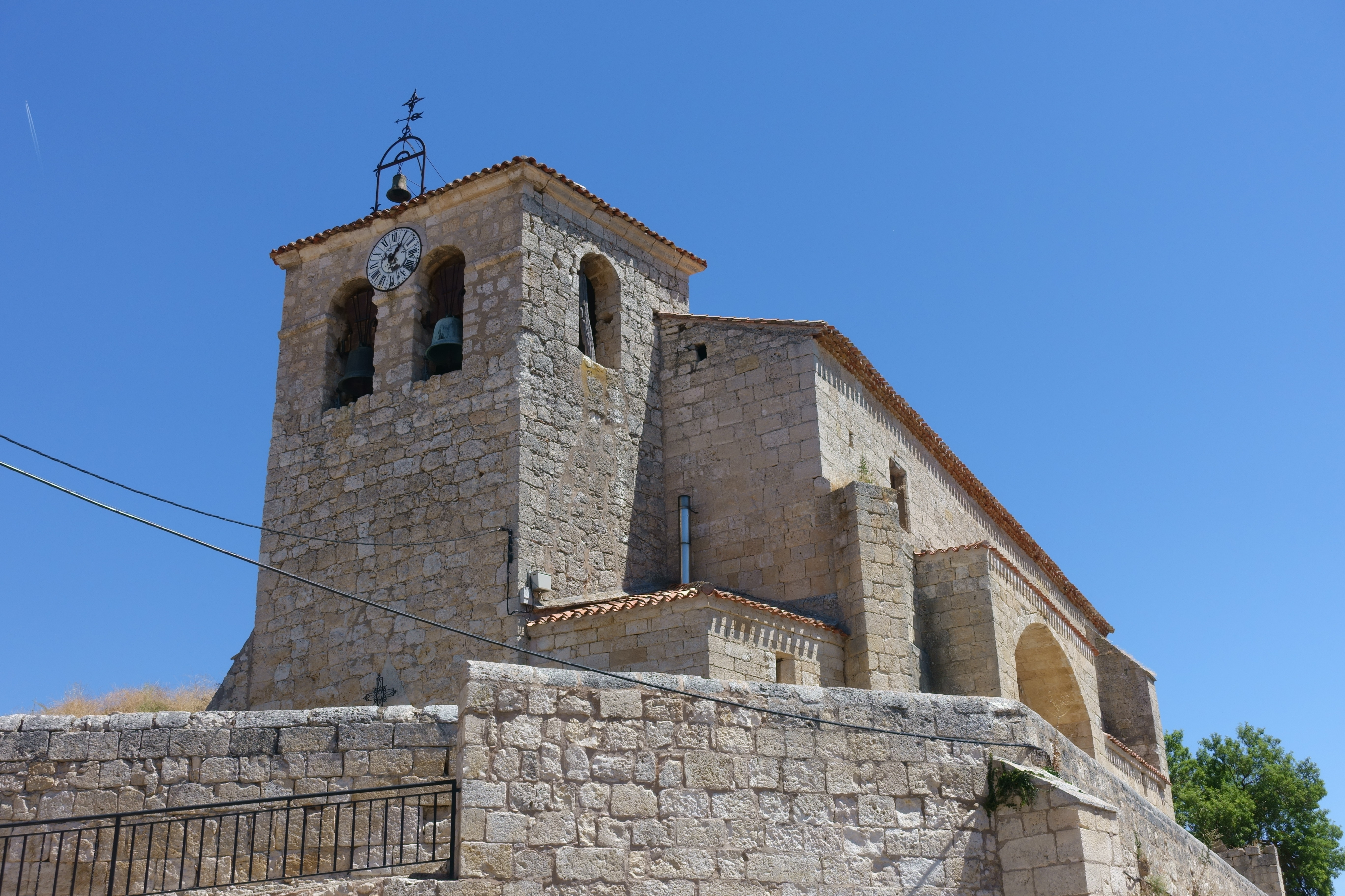 Iglesia de San Román, en Cobos de Cerrato (Palencia, España).